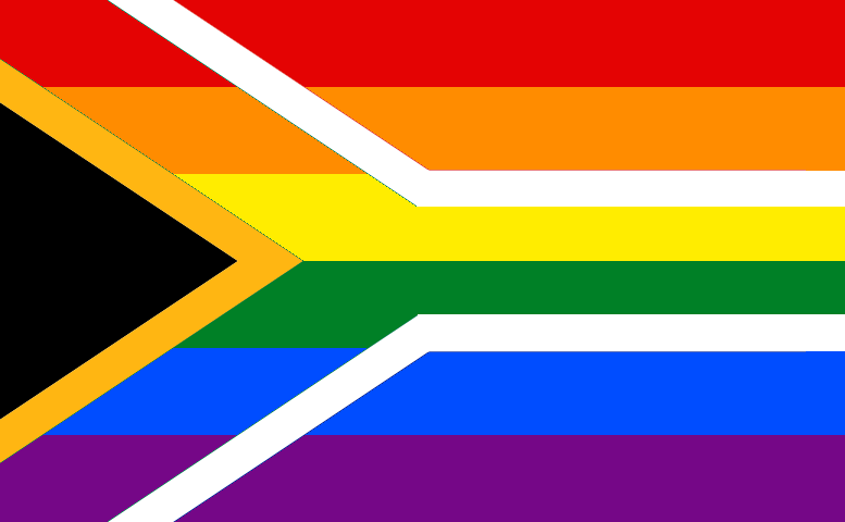 Bandera gay Sudáfrica.